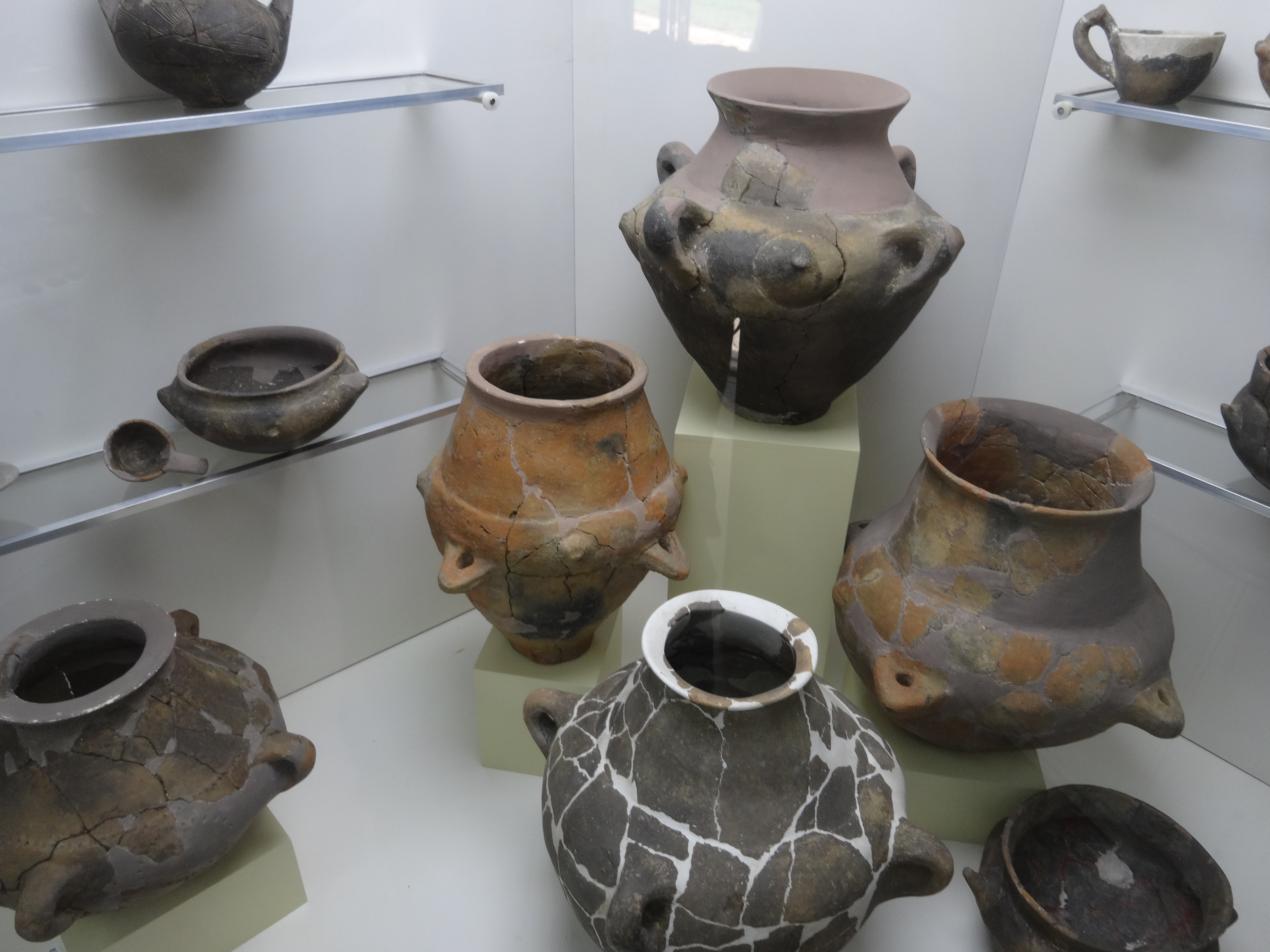 Muzej u Pirotu, eksponati su prikupljani na području tvrđave